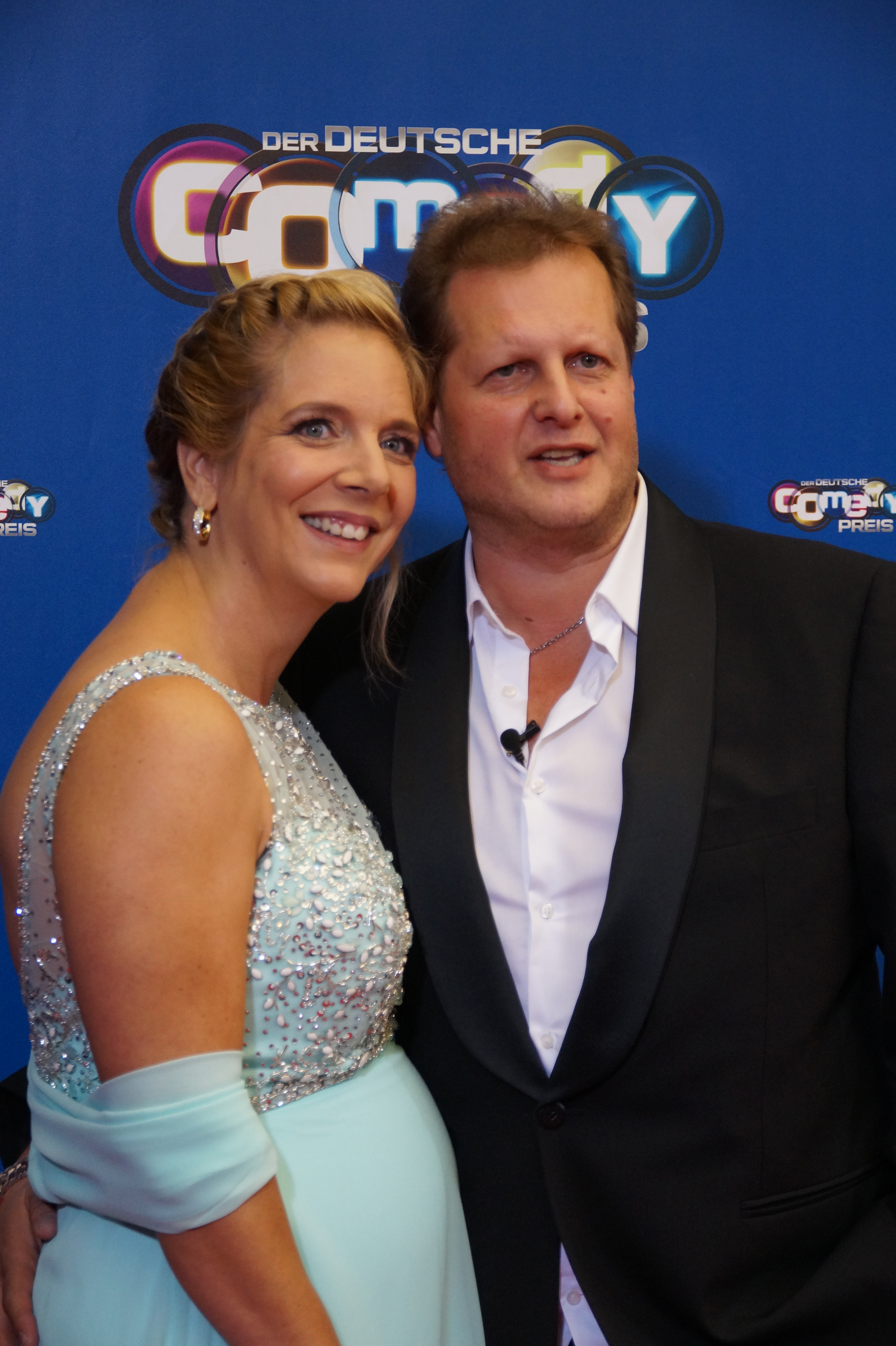 Jens Büchner mit Daniela Karabas beim Comedypreis 2016, im Oktober, Köln.